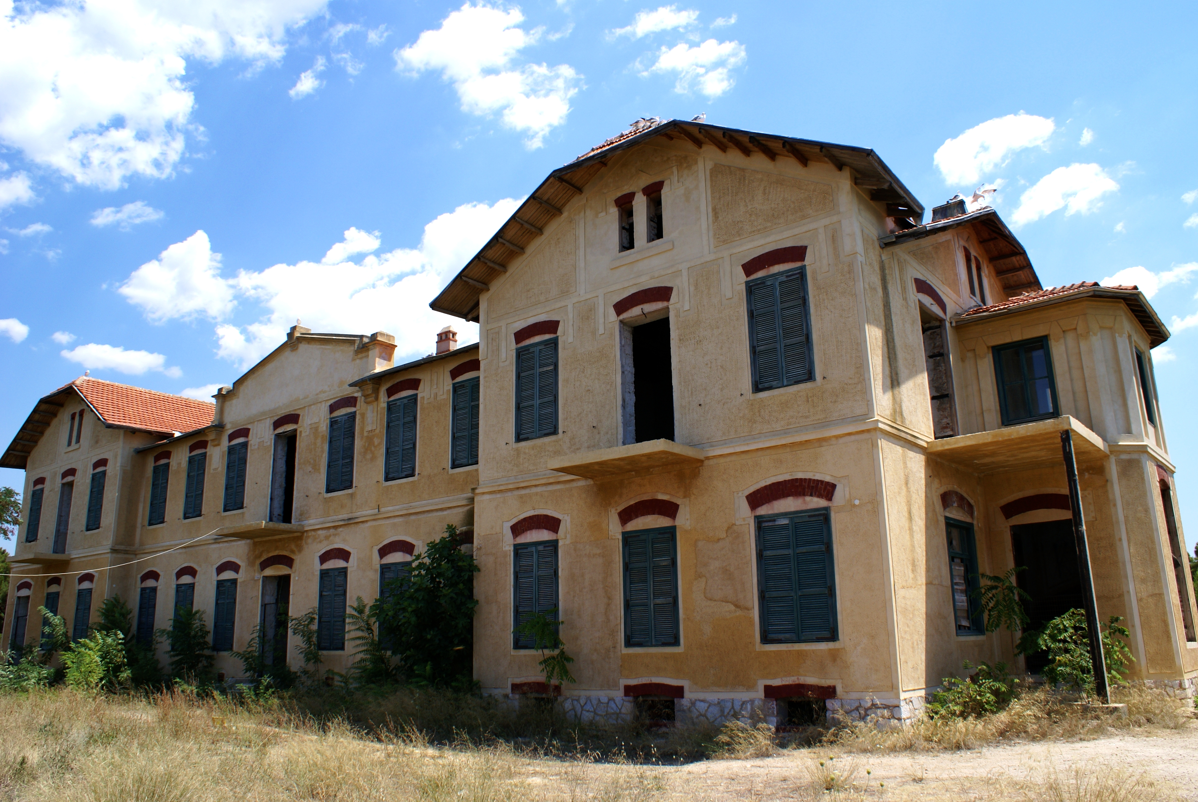 Παλατάκι Θάσου«Παλατάκι Θάσου»